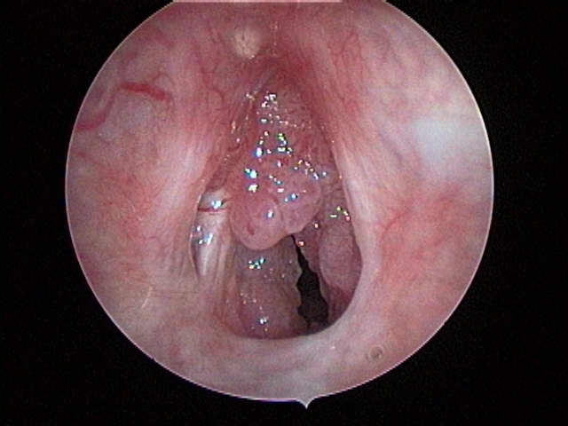 Papilomatosis Laringea